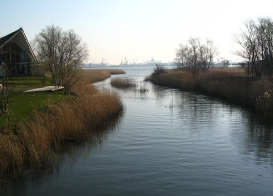 Mündung Schmarler Bach in die Unterwarnow. Mecklenburg-Vorpommern, Rostock.